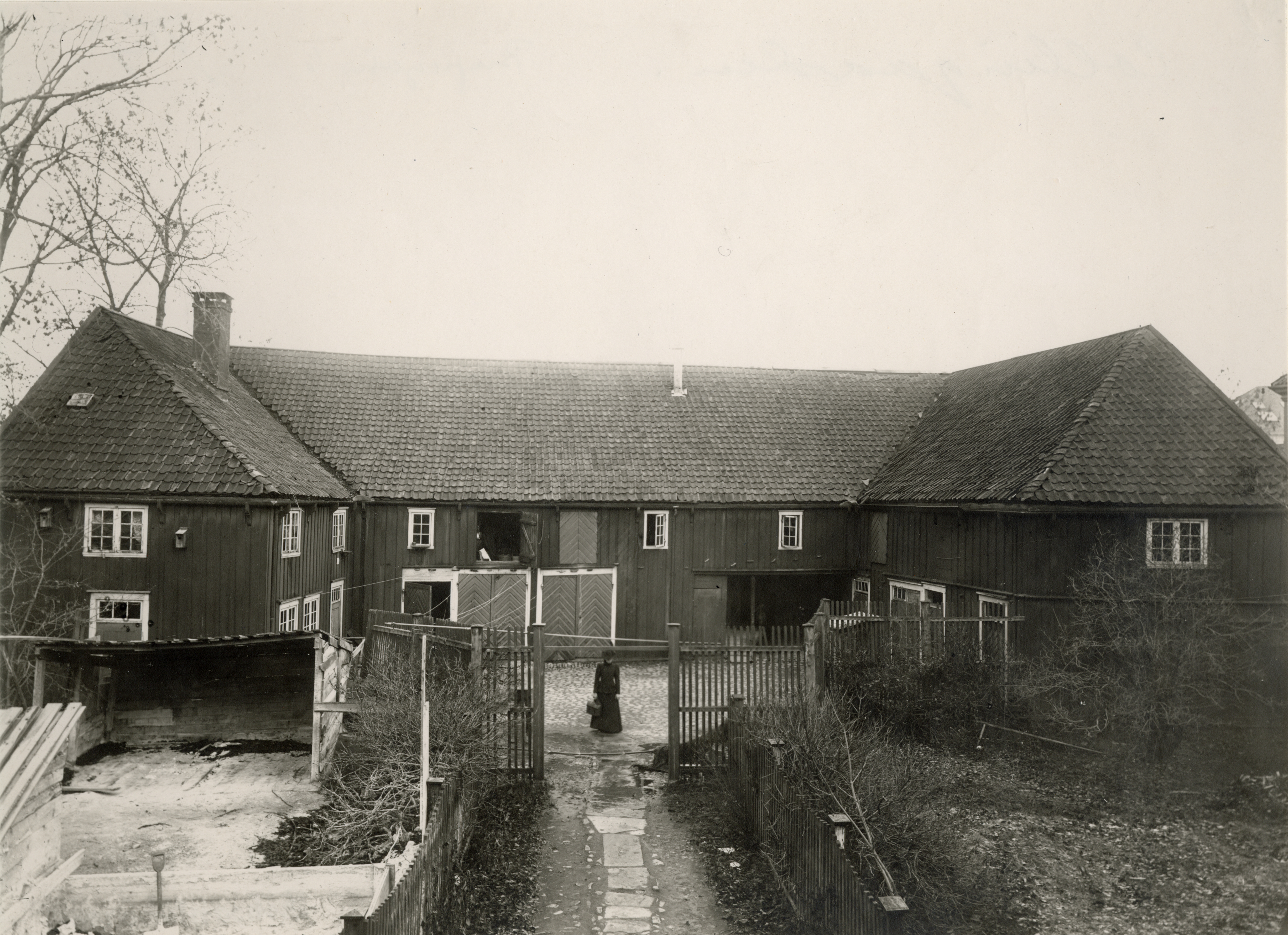 Collingården i Trondheim, Sør-Trøndelag Revet 1896, eller -97. This image on crowdsourcing geotagging platform Fotodugnad